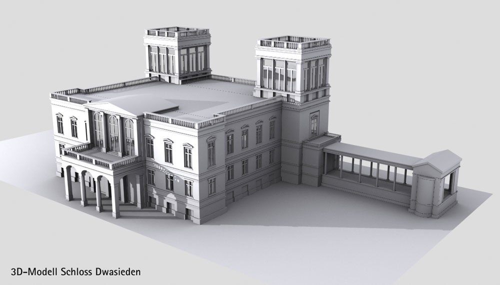 3D-Modell von Schloss Dwasieden, durch die Stadt Sassnitz in Auftrag gegeben und freigegeben.